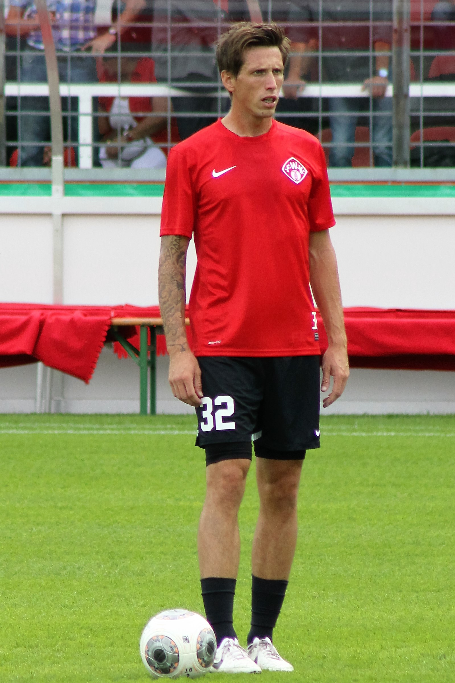 Lukas Billik Würzburger Kickers